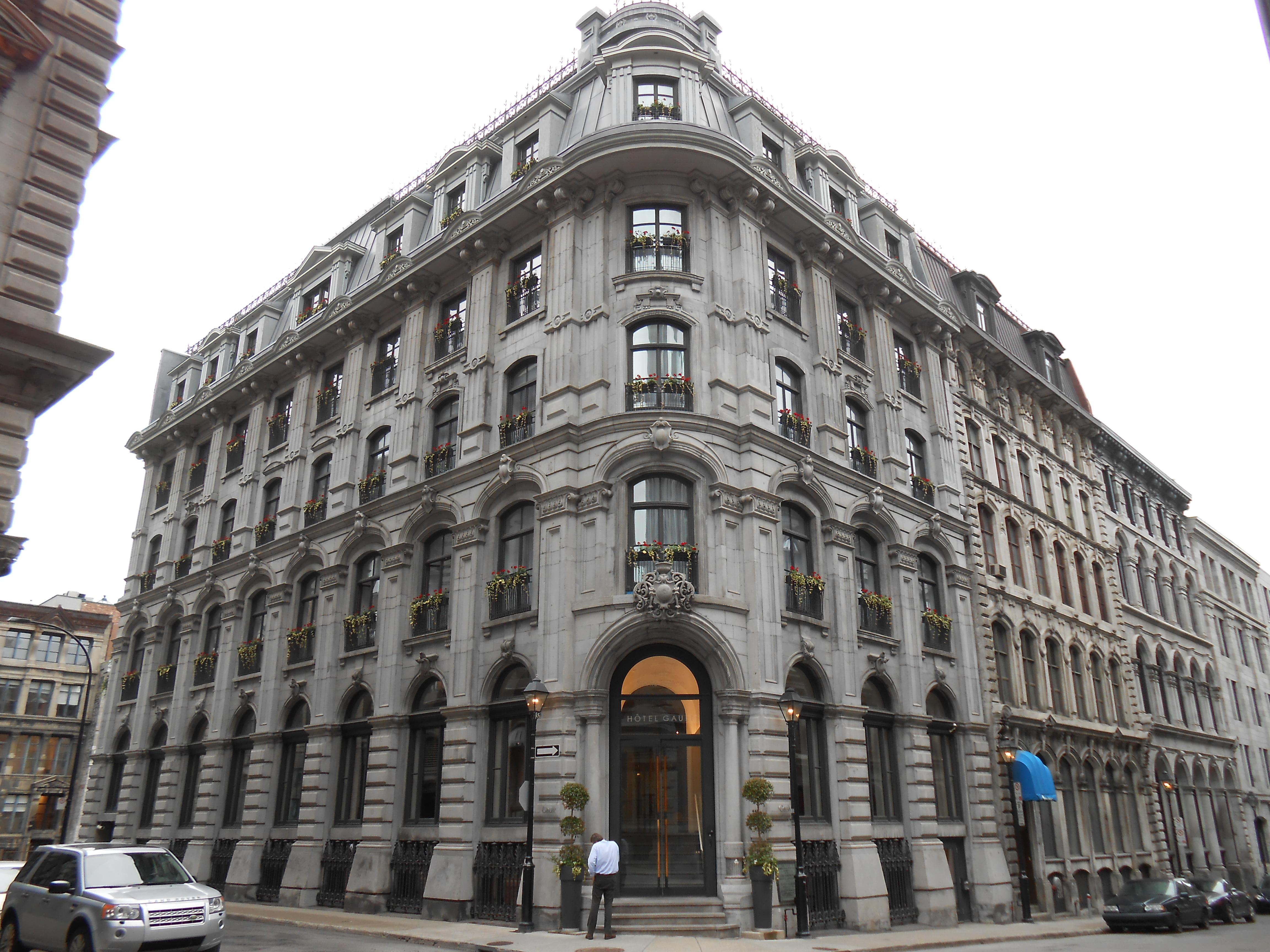 Hôtel Gault, 447-449, rue Sainte-Hélène / Rue des Récollets, Montréal